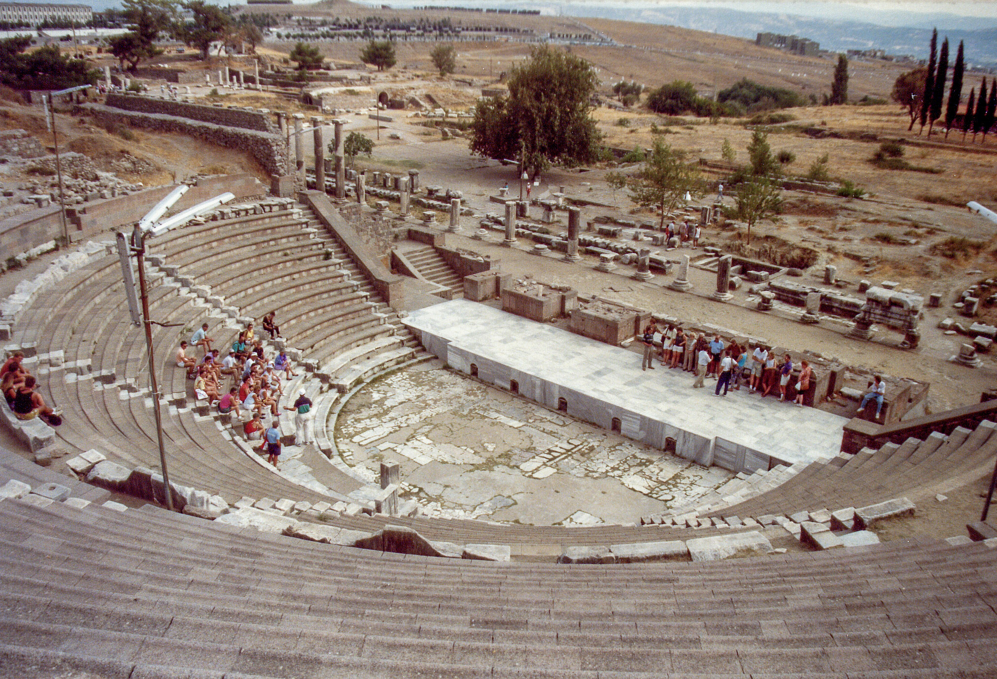 Pergamon, Westtürkei, Asklepieion, Hof vom Theater